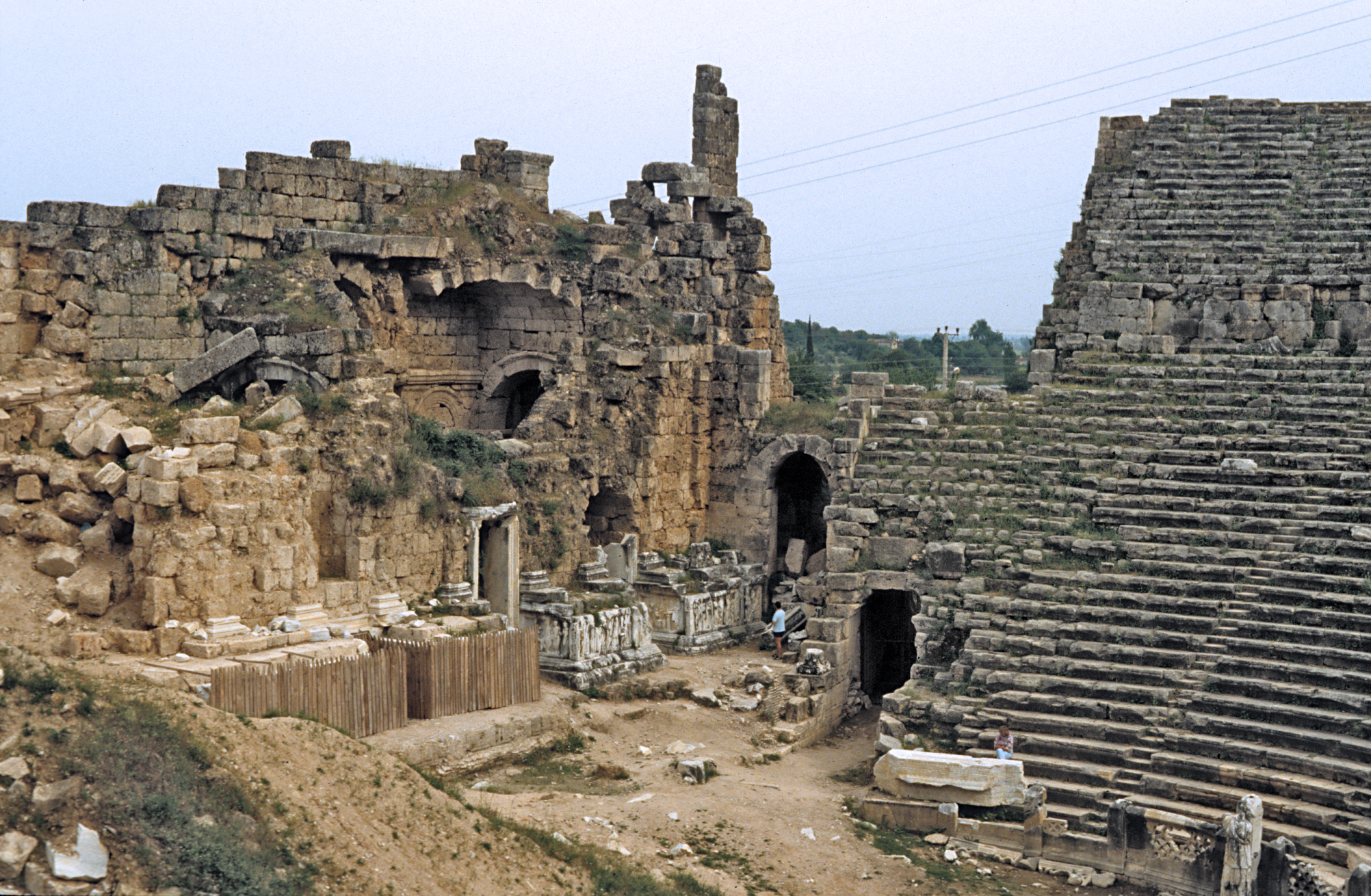 Perge, Südtürkei, Theater